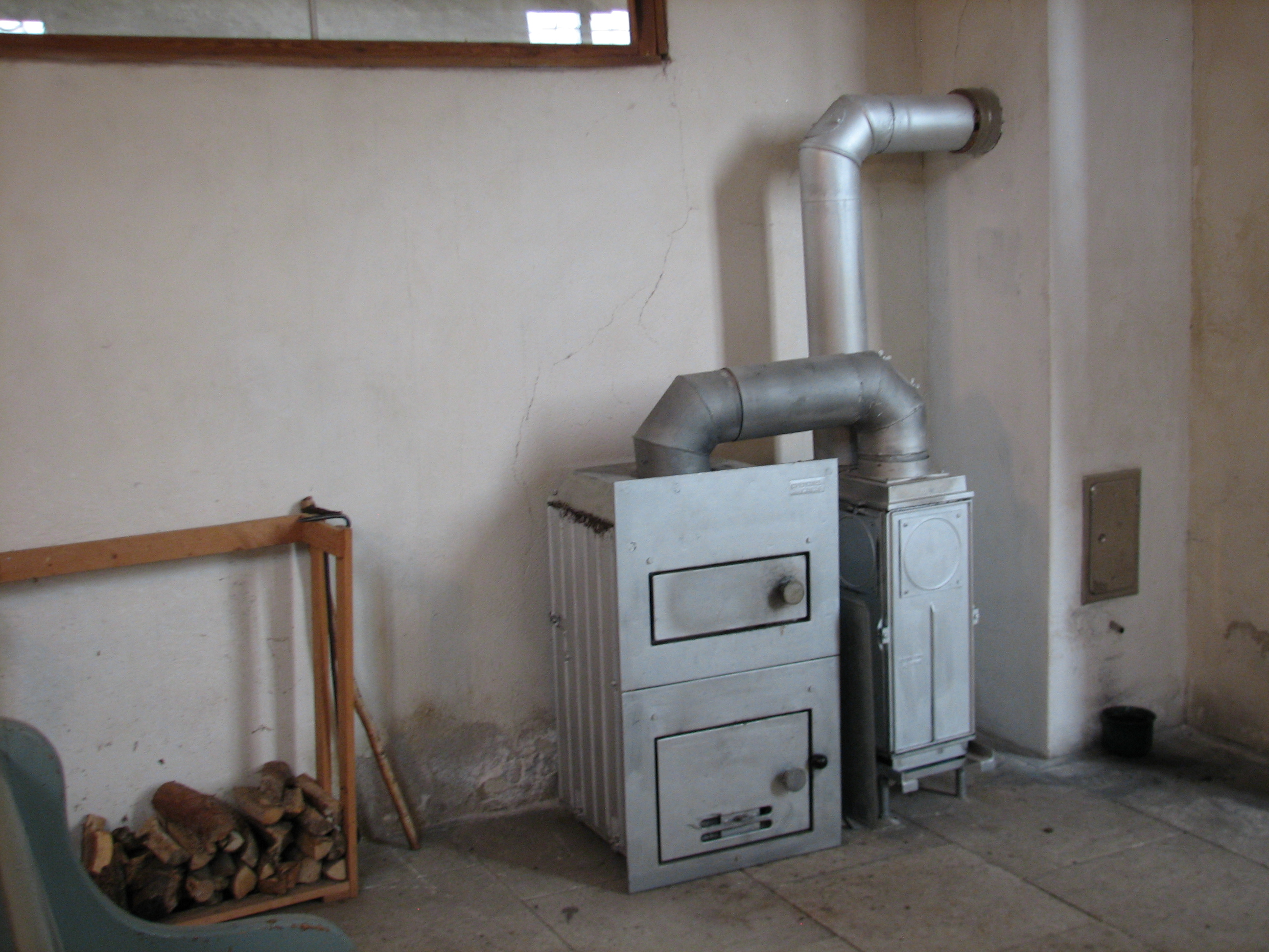 holzbefeuerter Ofen